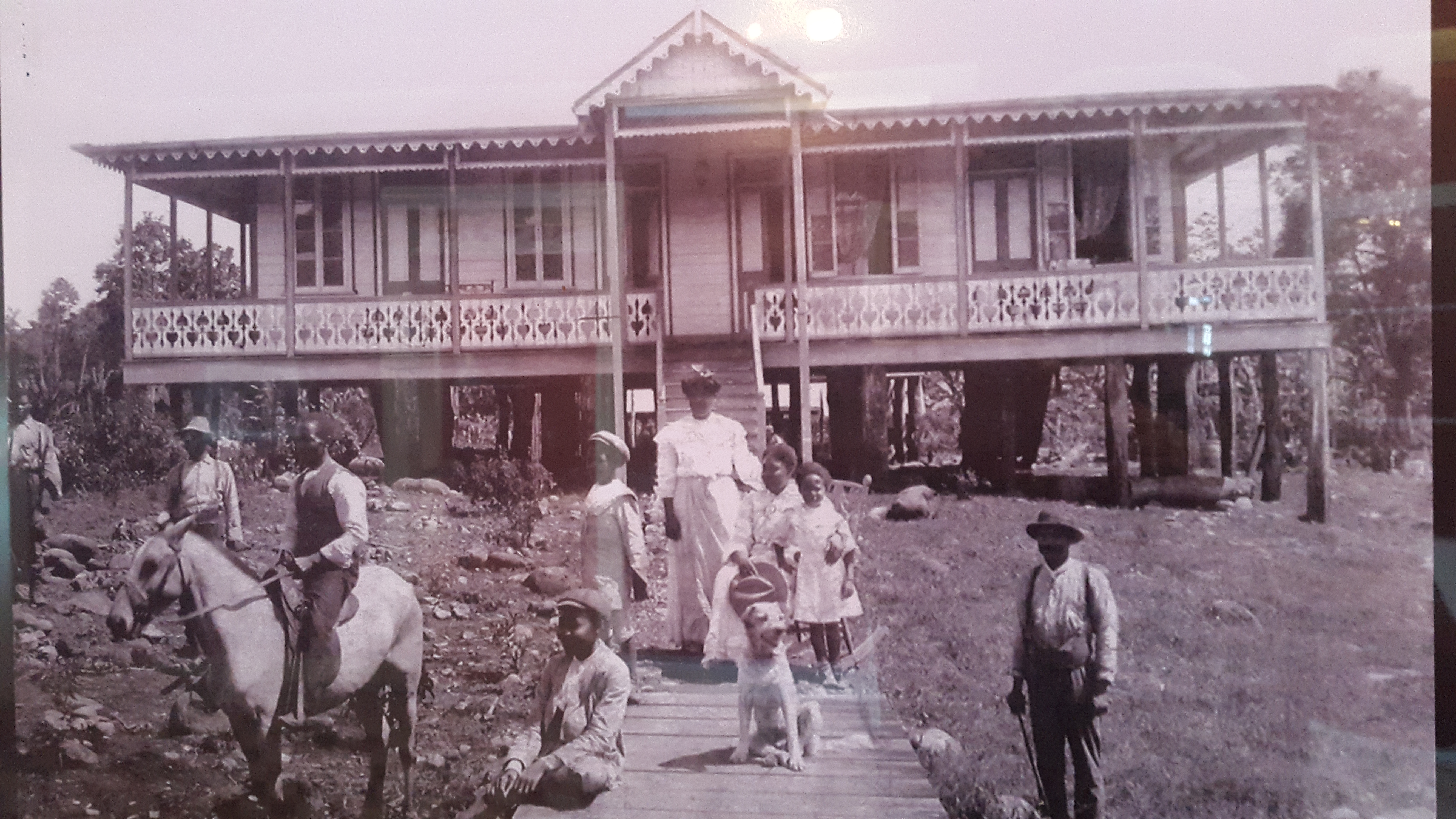 Fotografía de finales del siglo XIX, de autor desconocido, que retrata a una familia limonense. Museo Nacional de Costa Rica.